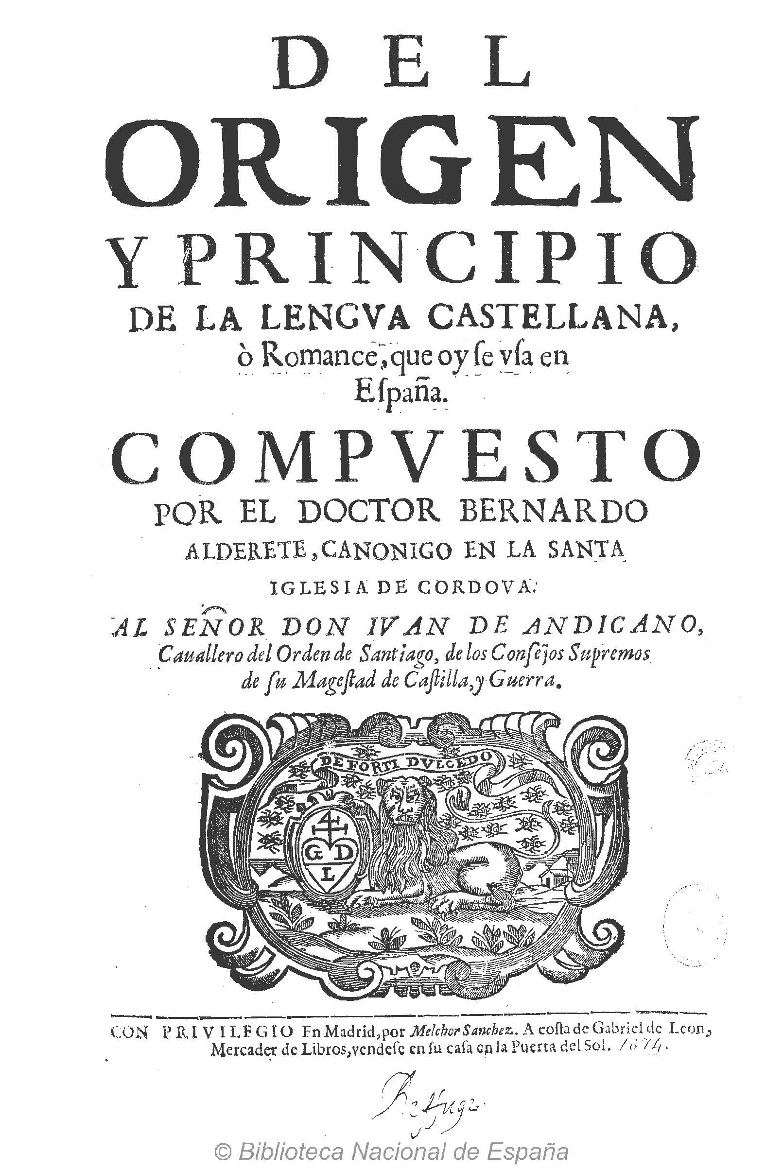 Del origen y principio de la lengua castellana, ò Romance que oy se vsa en España [Texto impreso] / compuesto por el Doctor Bernardo Aldrete ... al señor don I uan de Andicano .... - En Madrid : por Melchor Sanchez : a costa de Gabriel de Leon ..., 1674. - 3 pt. en 1 v. ([4], 89, [1] h. ; [6], 274 [i.e. 267], [1] h. ; 213, [3] h.) ; Fol. Signatura U/7077